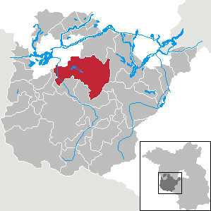 Kloster Lehnin in Brandenburg (Country) - District Potsdam-Mittelmark